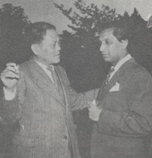 언커크 인도측 대표인 바하돌 싱과 면담중인 조병옥